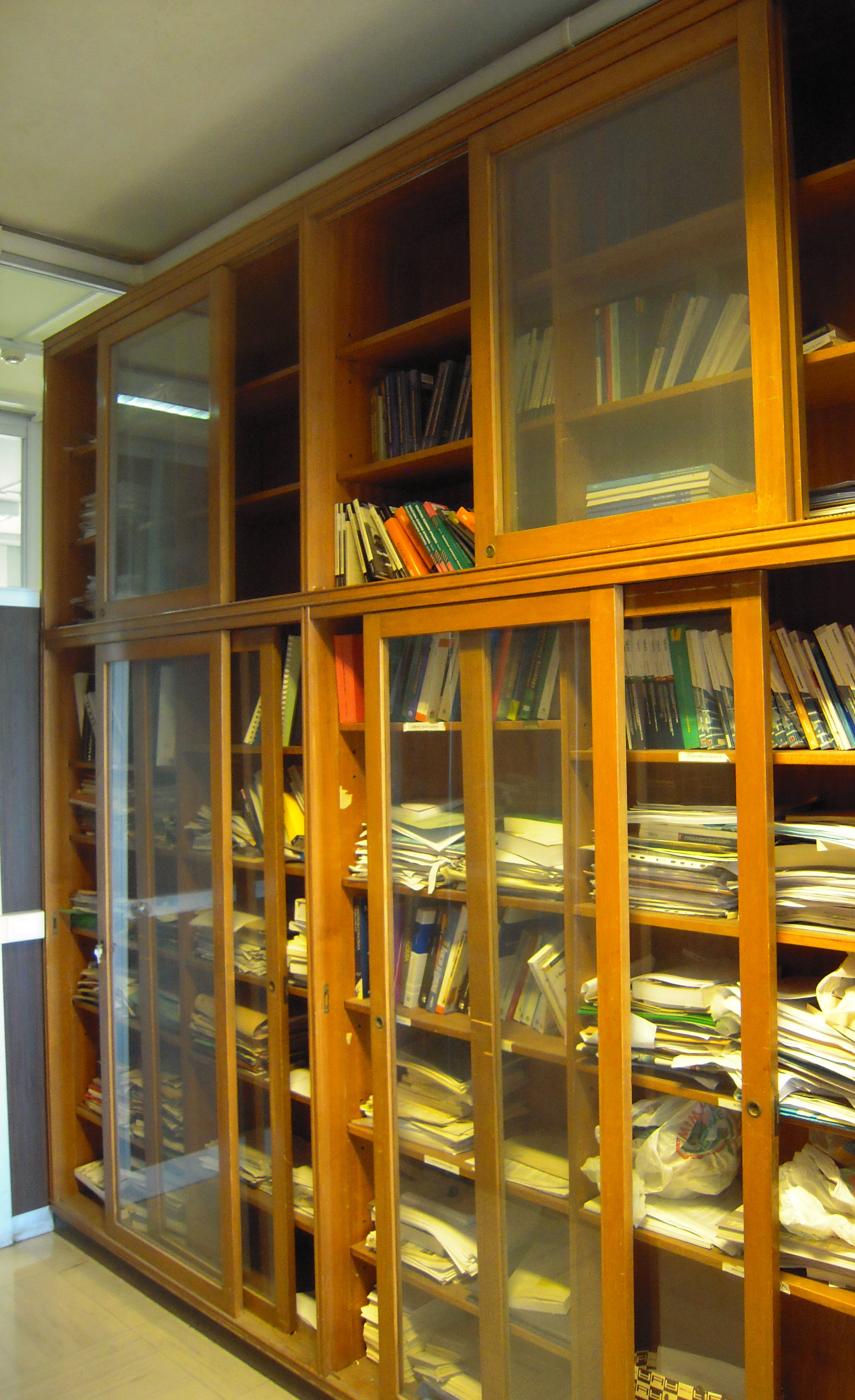 La libreria di Federico Caffè nella Facoltà di Economia dell'università La Sapienza di Roma